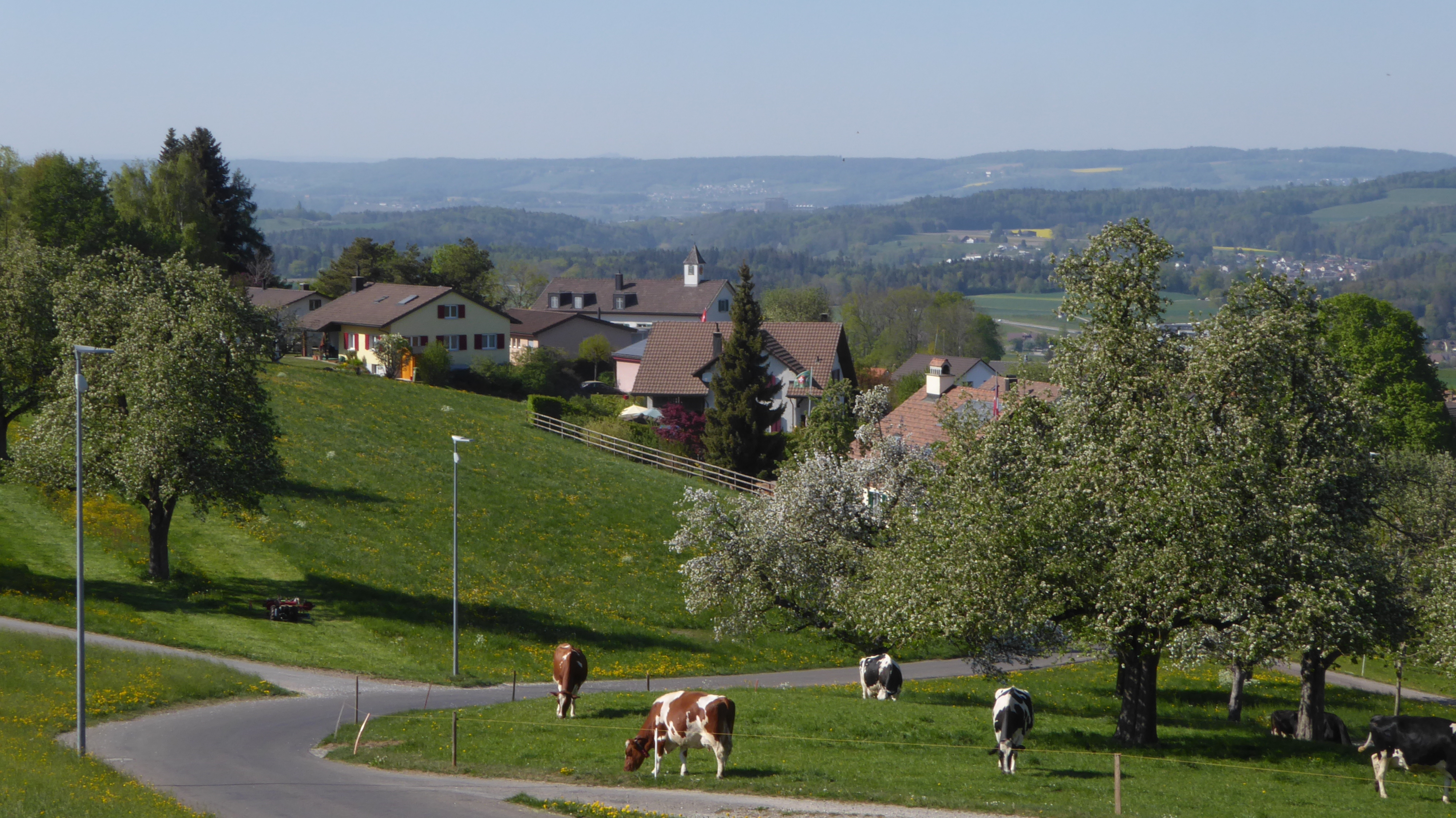 Untertuttwil im Frühling